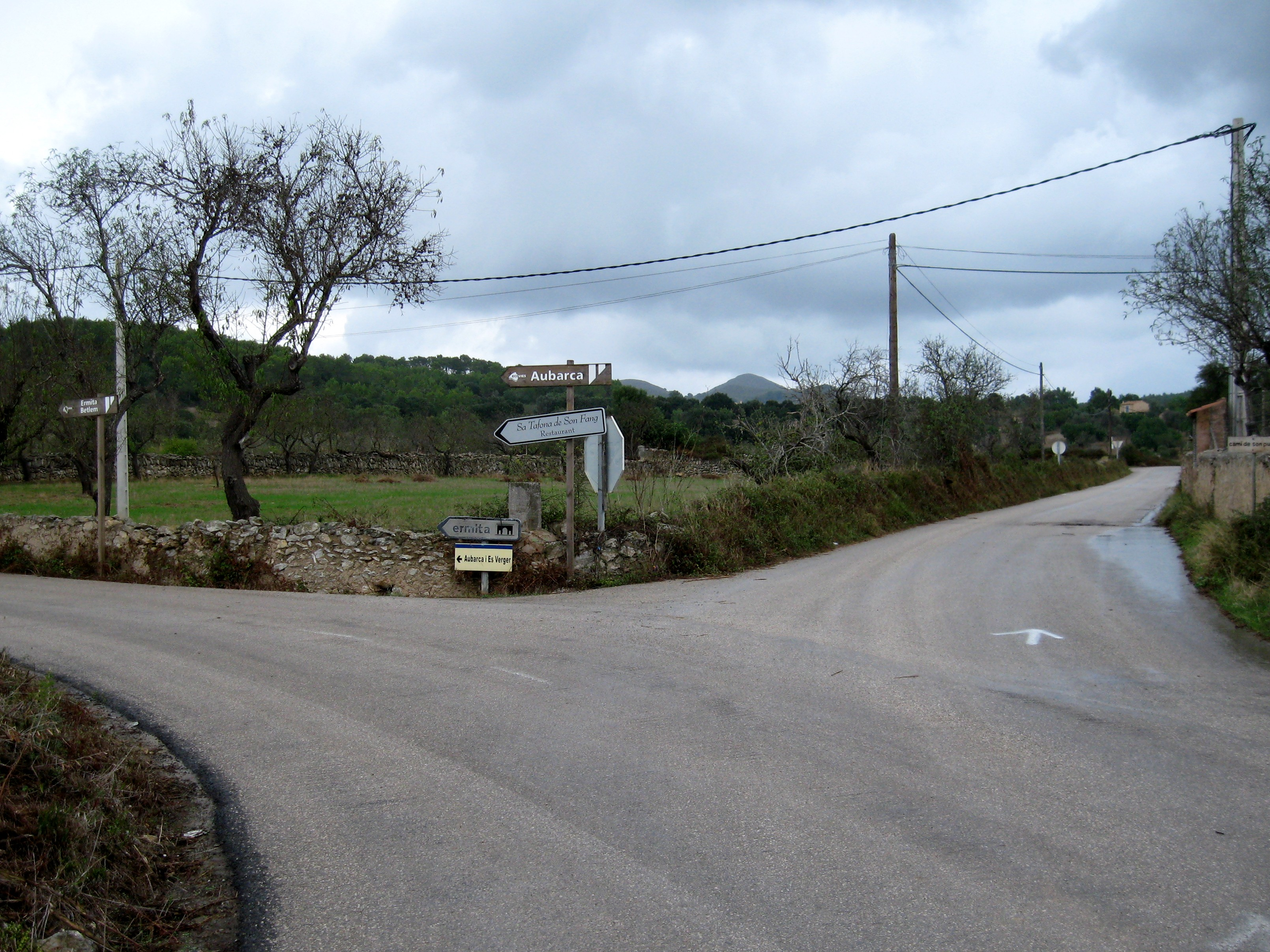 Hinweisschild nach Aubarca und es Verger an der Straße von Artà zur Ermita de Betlem, Gemeinde Artà, Mallorca, Spanien